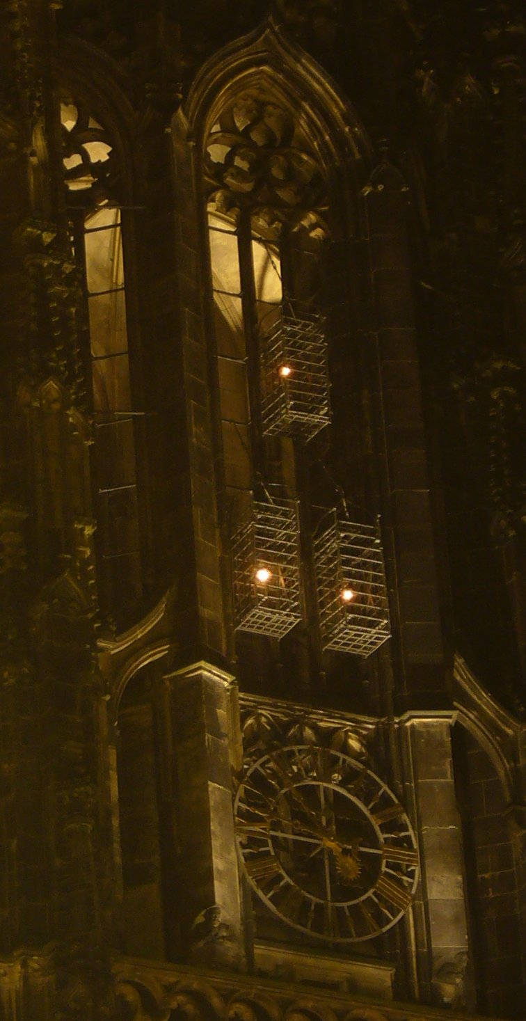 "Drei Irrlichter", Skulptur von Lothar Baumgarten am Turm der Lamberti-Kirche in Münster, Germany